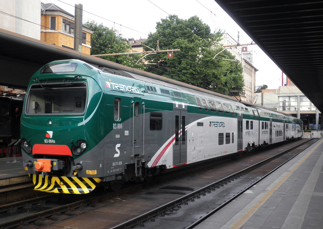 Elettrotreno TSR in livrea Trenord, in sosta a Milano Cadorna in occasione di Trenord Open Day 2012